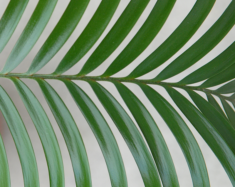 Lepidozamia Peroffskyana Leaf